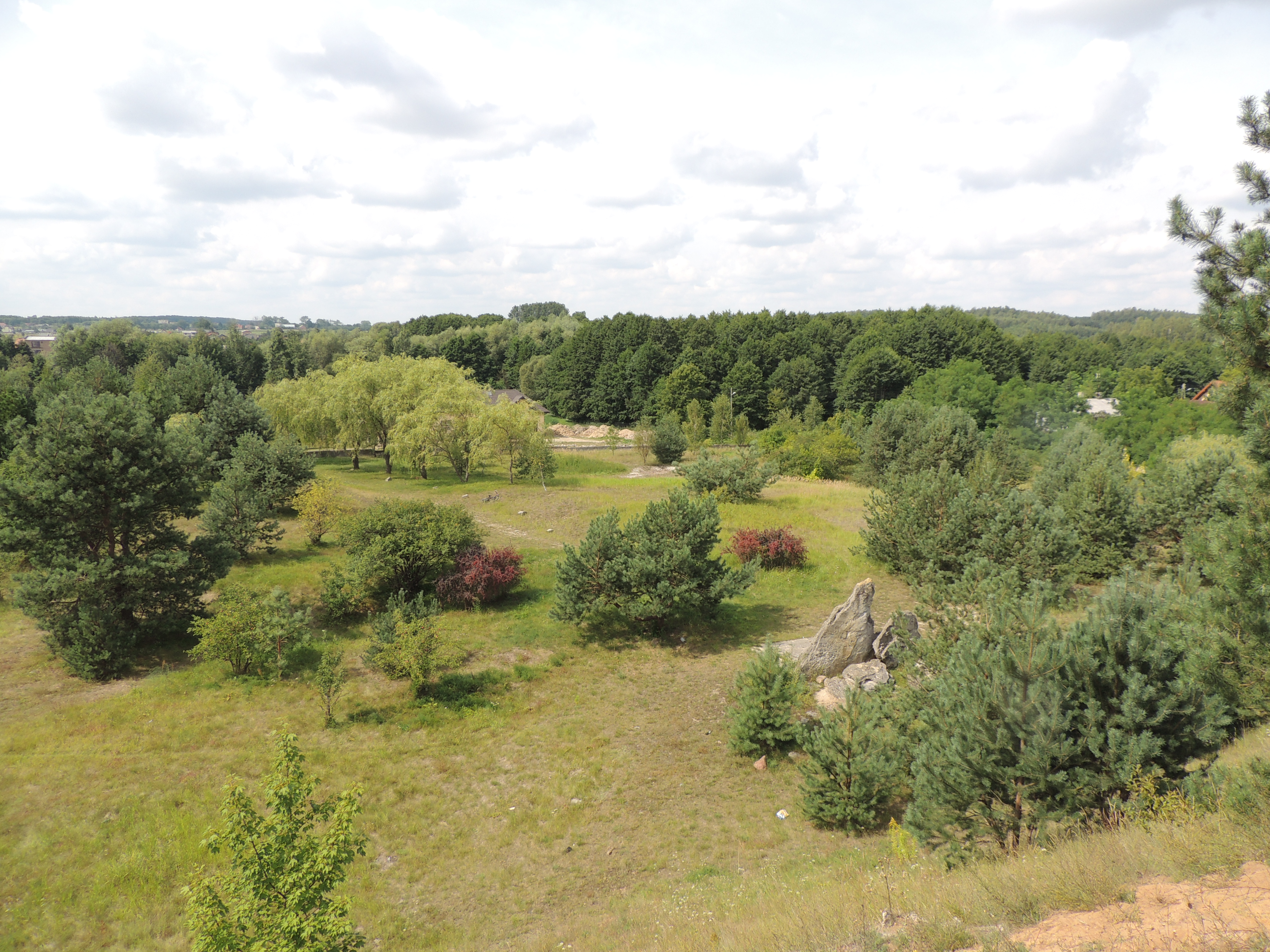 Jewish cemetery in Brzeziny